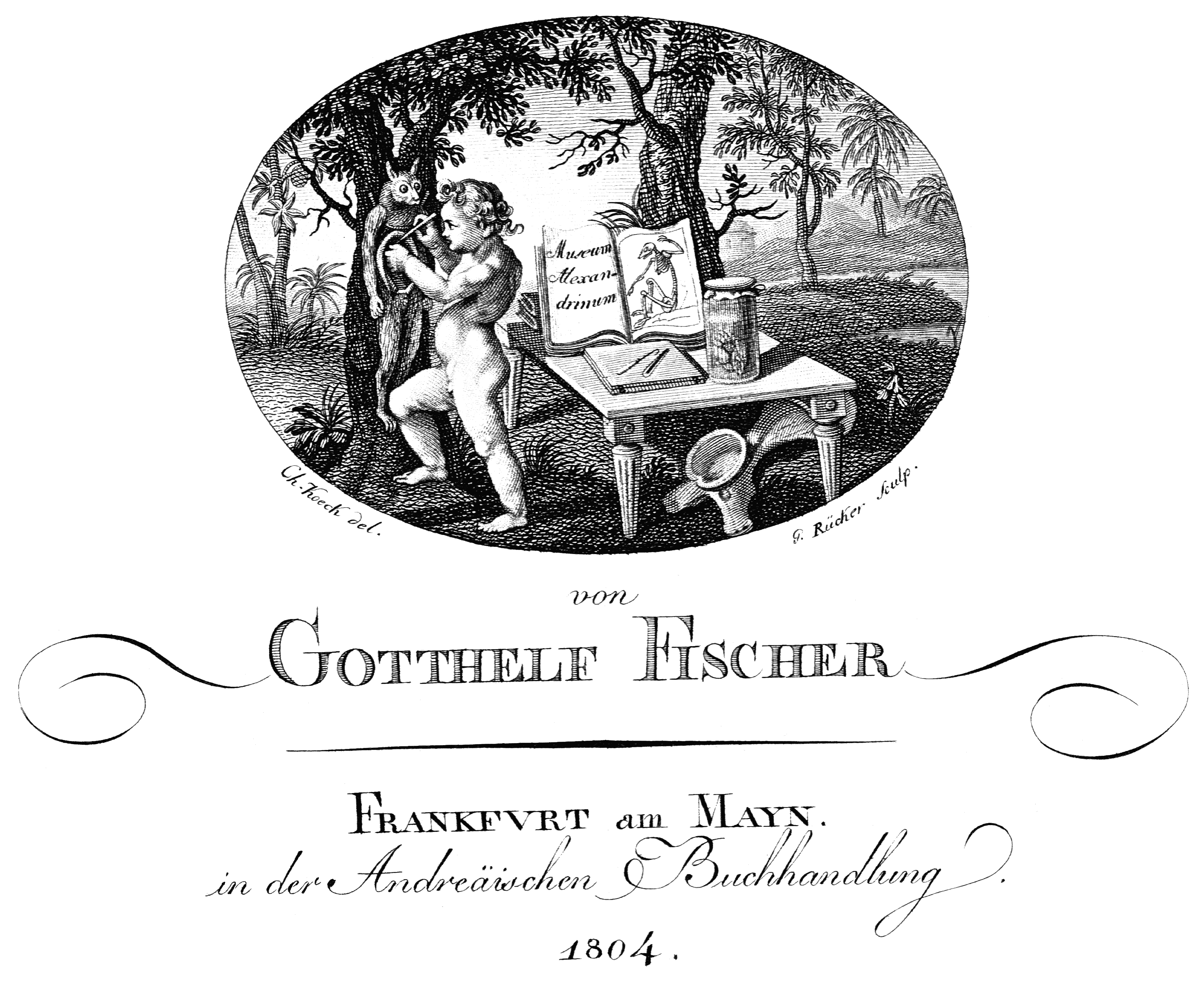 Fisher Gotthelf, 1804.